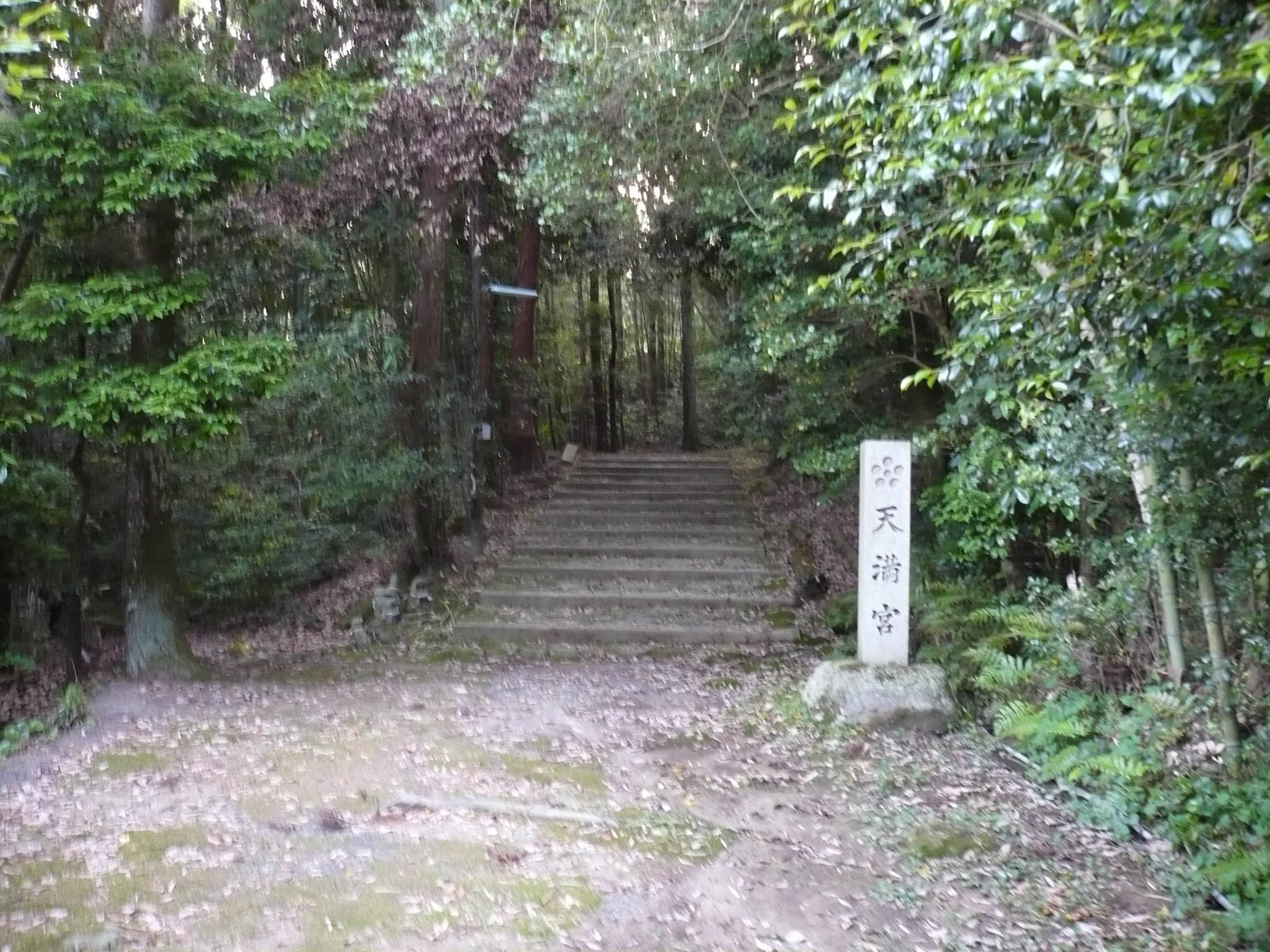 天満宮